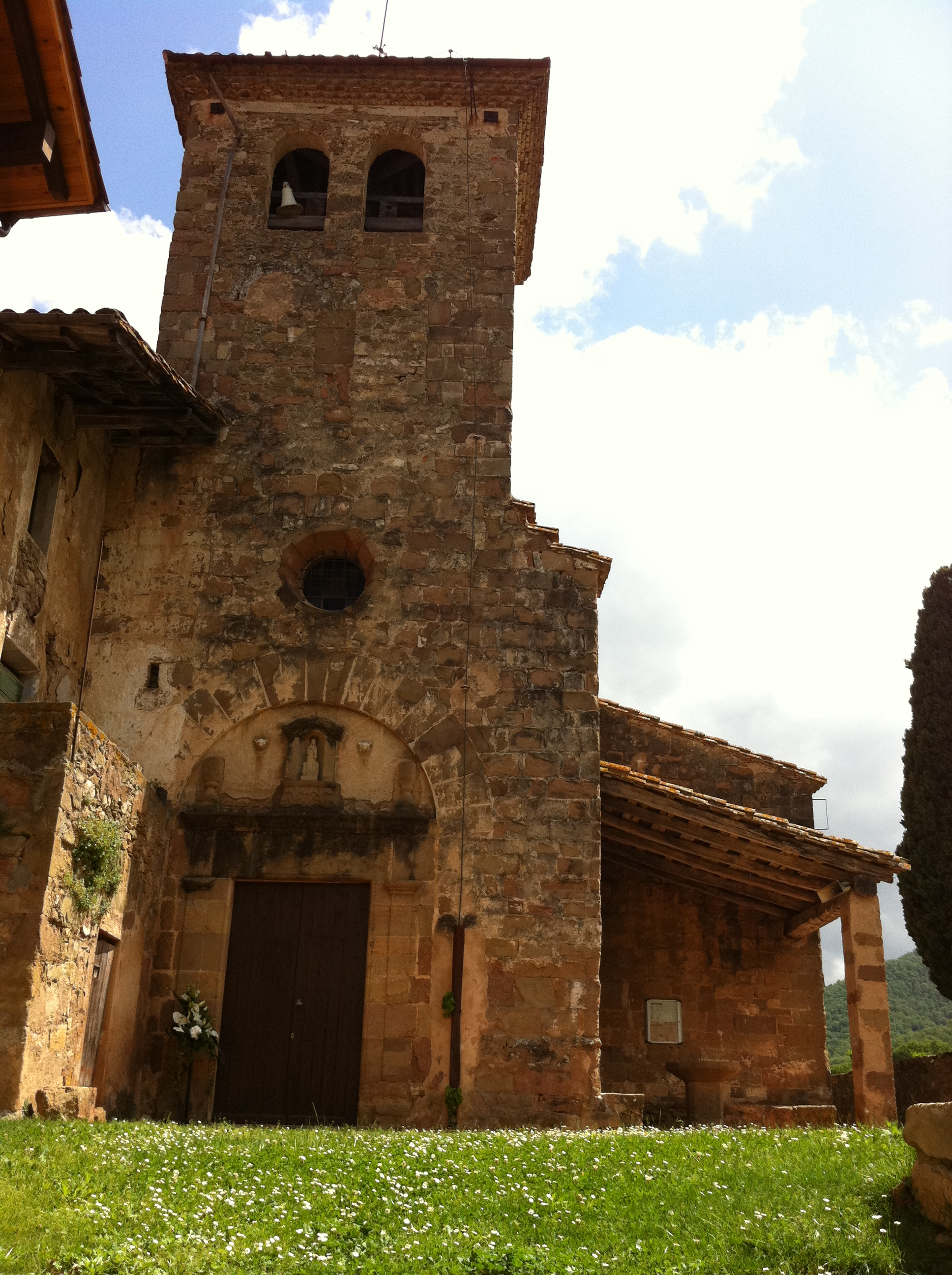 Església de Santa Margarida de Bianya (la Vall de Bianya)